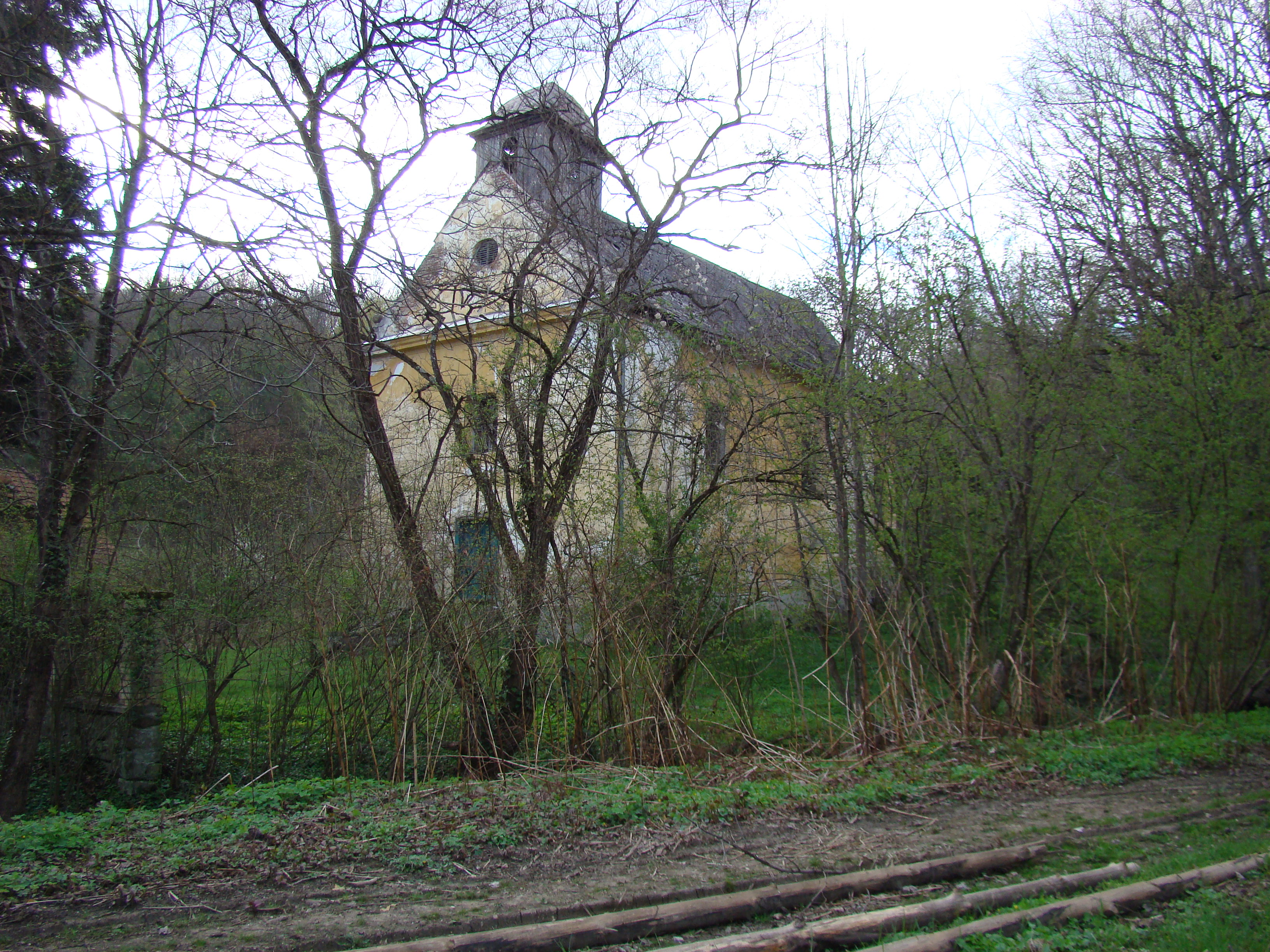 Ansamblul castelului Konopi